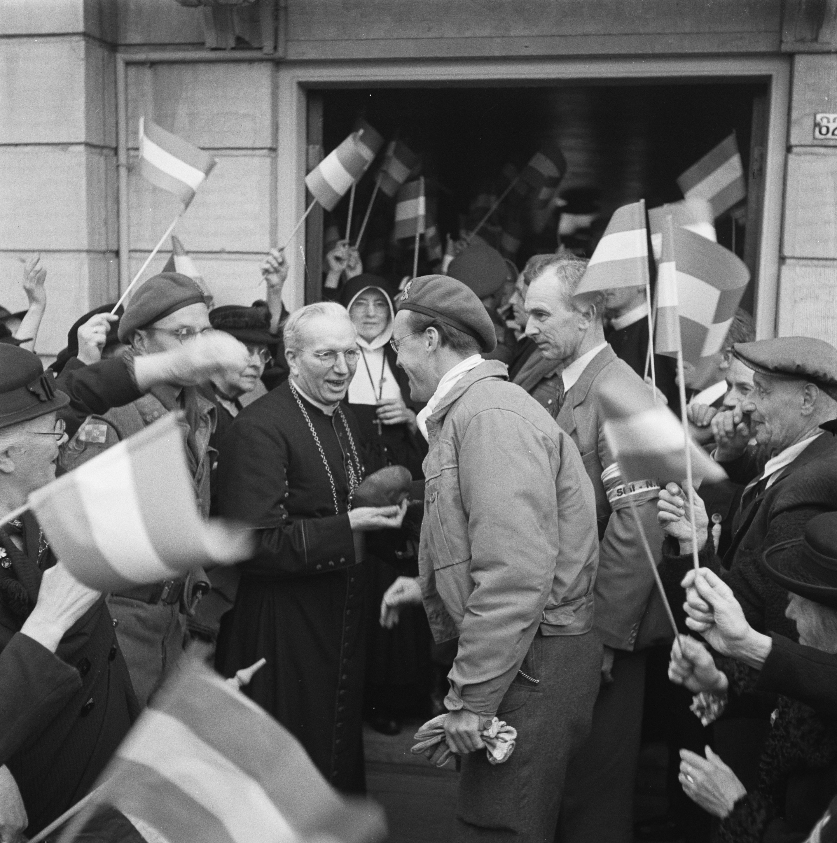 Collectie / Archief : Fotocollectie Anefo Reportage / Serie : Front Noord-Oost Nederland: rondreis Prins Bernhard Beschrijving : De prins begroet de bisschop van Roermond, mgr Lemmens, die tijdelijk verblijft in het St. Jozefpension aan de Voorstreek in Leeuwarden. Datum : april 1945 Locatie : Friesland, Leeuwarden Trefwoorden : bisschoppen, prinsen Persoonsnaam : Bernhard (prins Nederland), Lemmens, J.H.G. Fotograaf : Poll, Willem van de / Anefo, [onbekend] Auteursrechthebbende : Nationaal Archief Materiaalsoort : Negatief (zwart/wit) Nummer archiefinventaris : bekijk toegang 2.24.01.03 Bestanddeelnummer : 900-2546